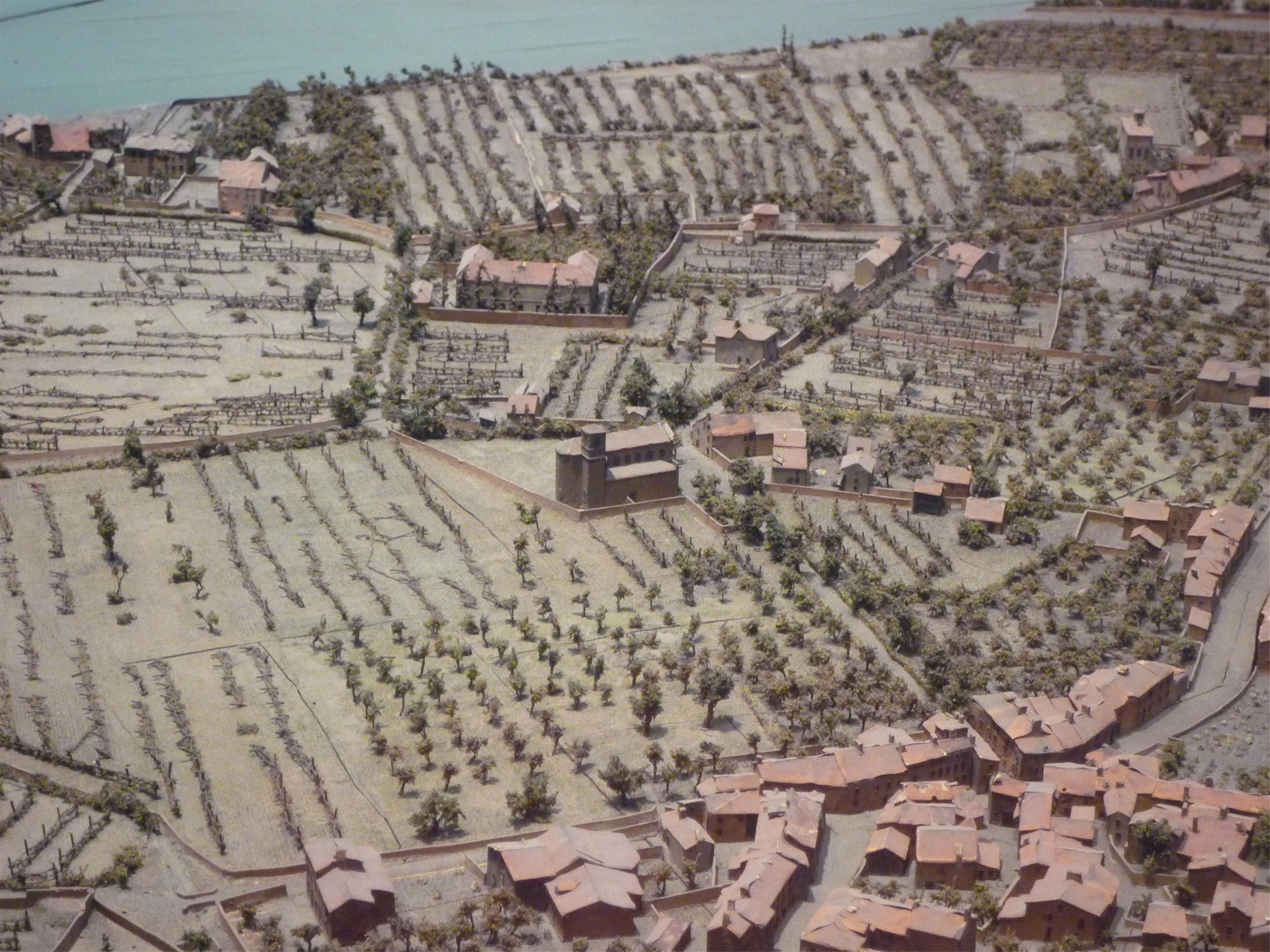 Église St Ferjus à La Tronche sur plan-relief de Grenoble (1848).